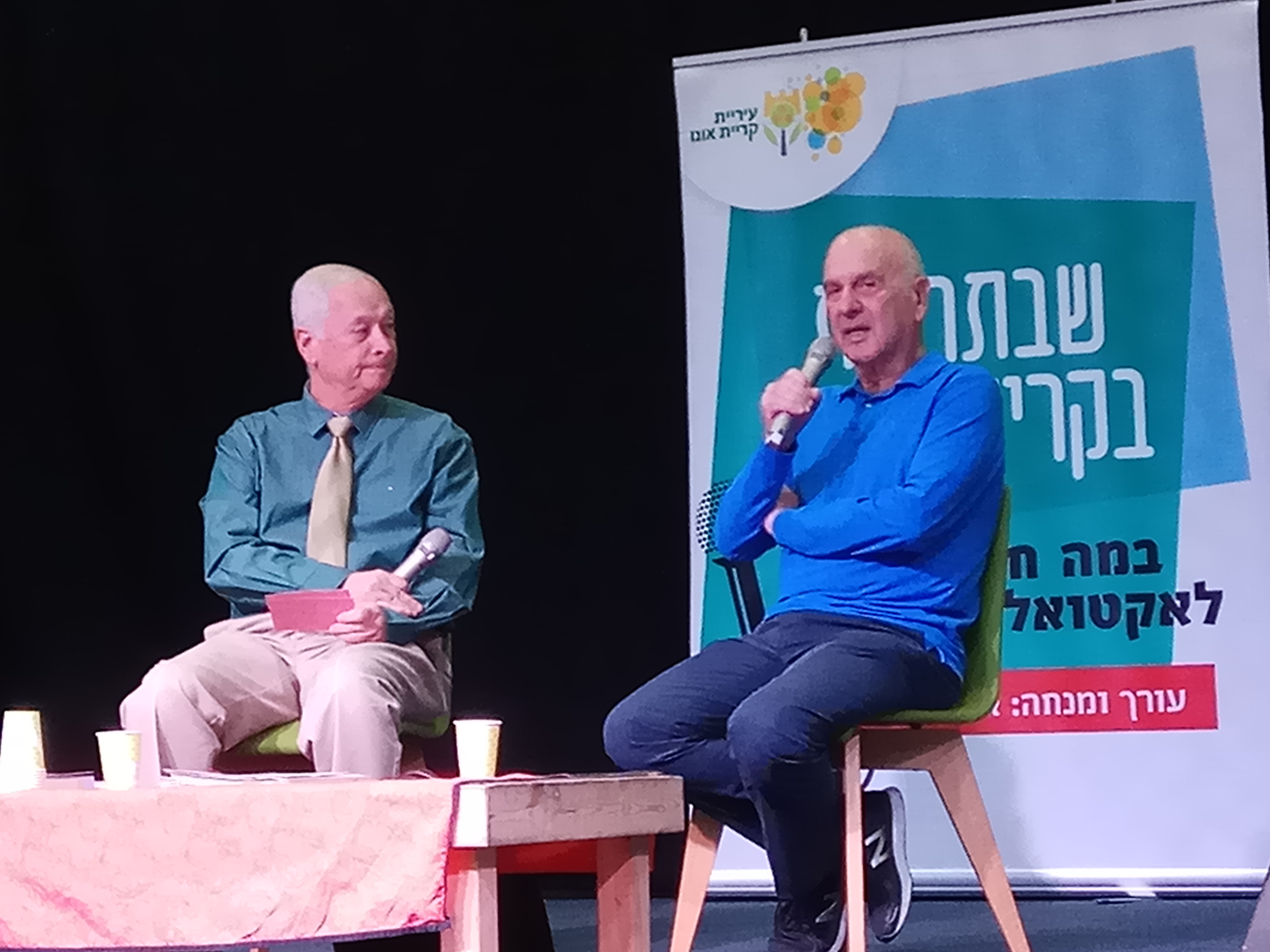 מתן וילנאי באירוע שבתרבות עם אבי בטלהיים בקריית אונו